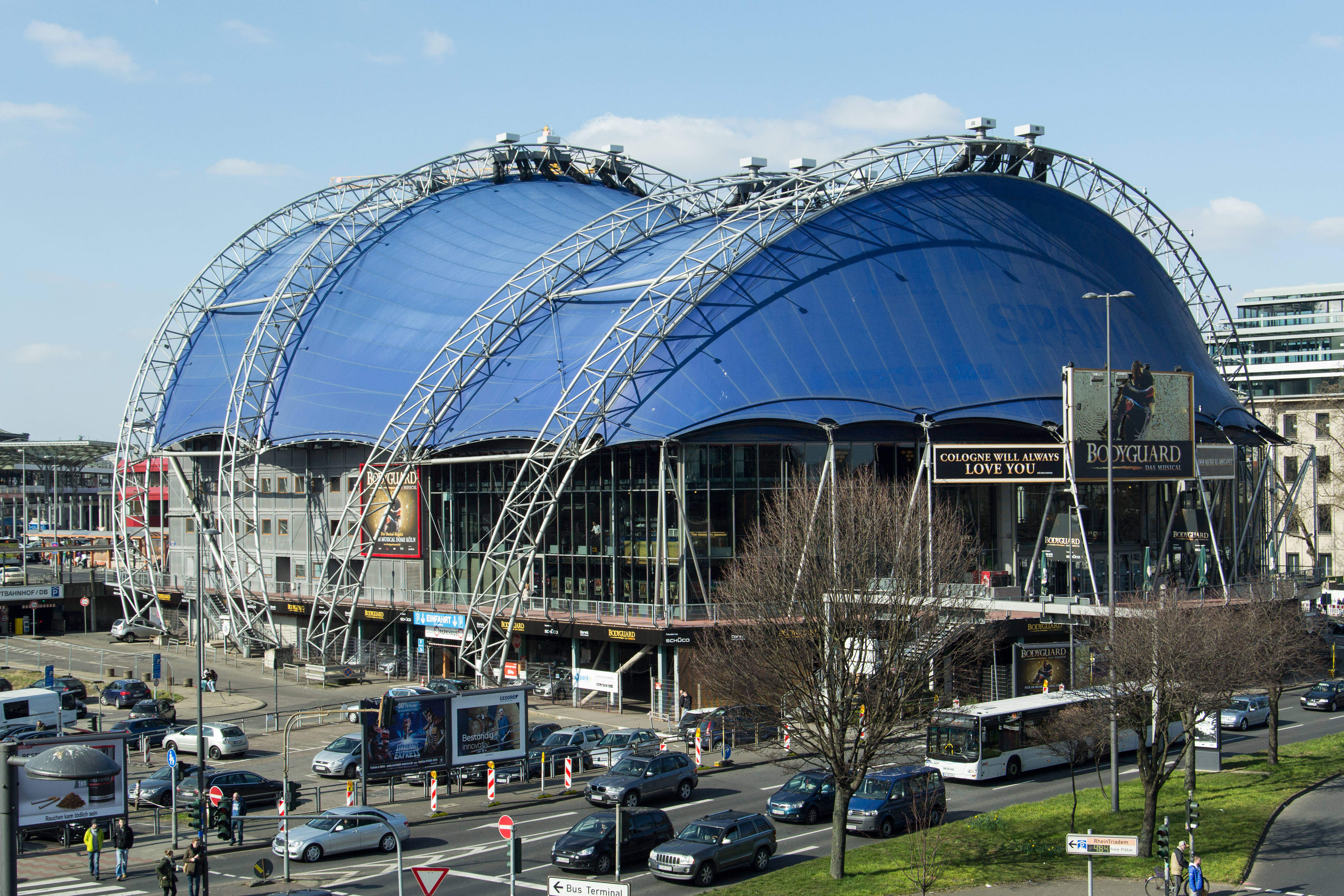 Der Musical Dome in Köln